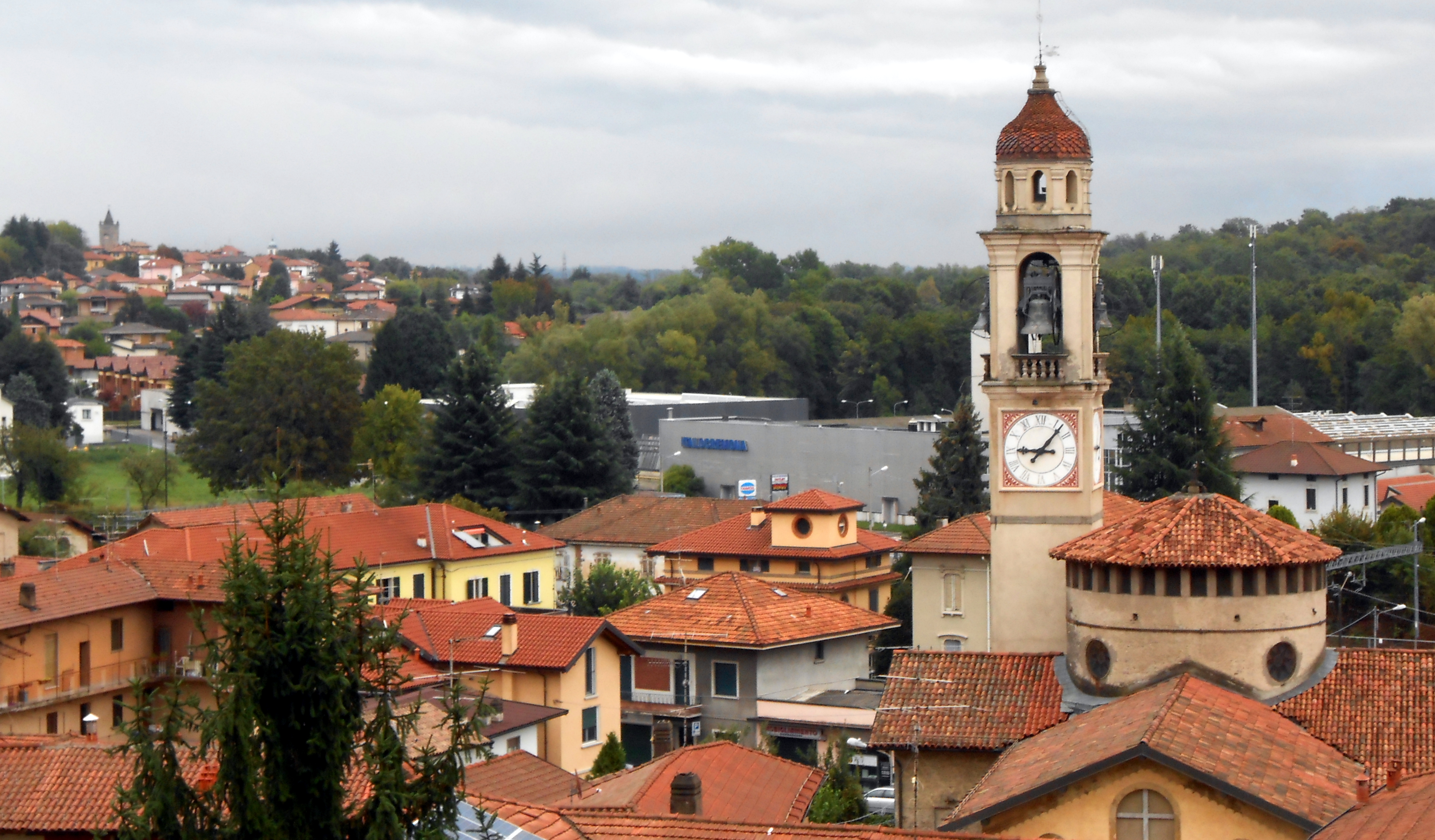 Gazzada- Panorama